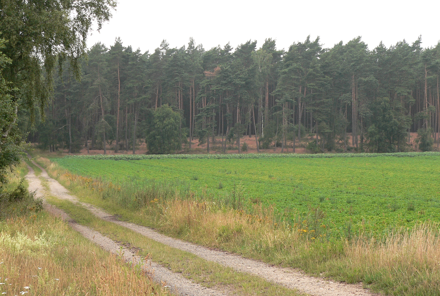 Hochfläche auf dem Drawehn bei Maddau